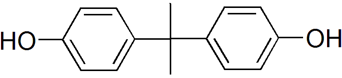 Struktur: Tor Svensson